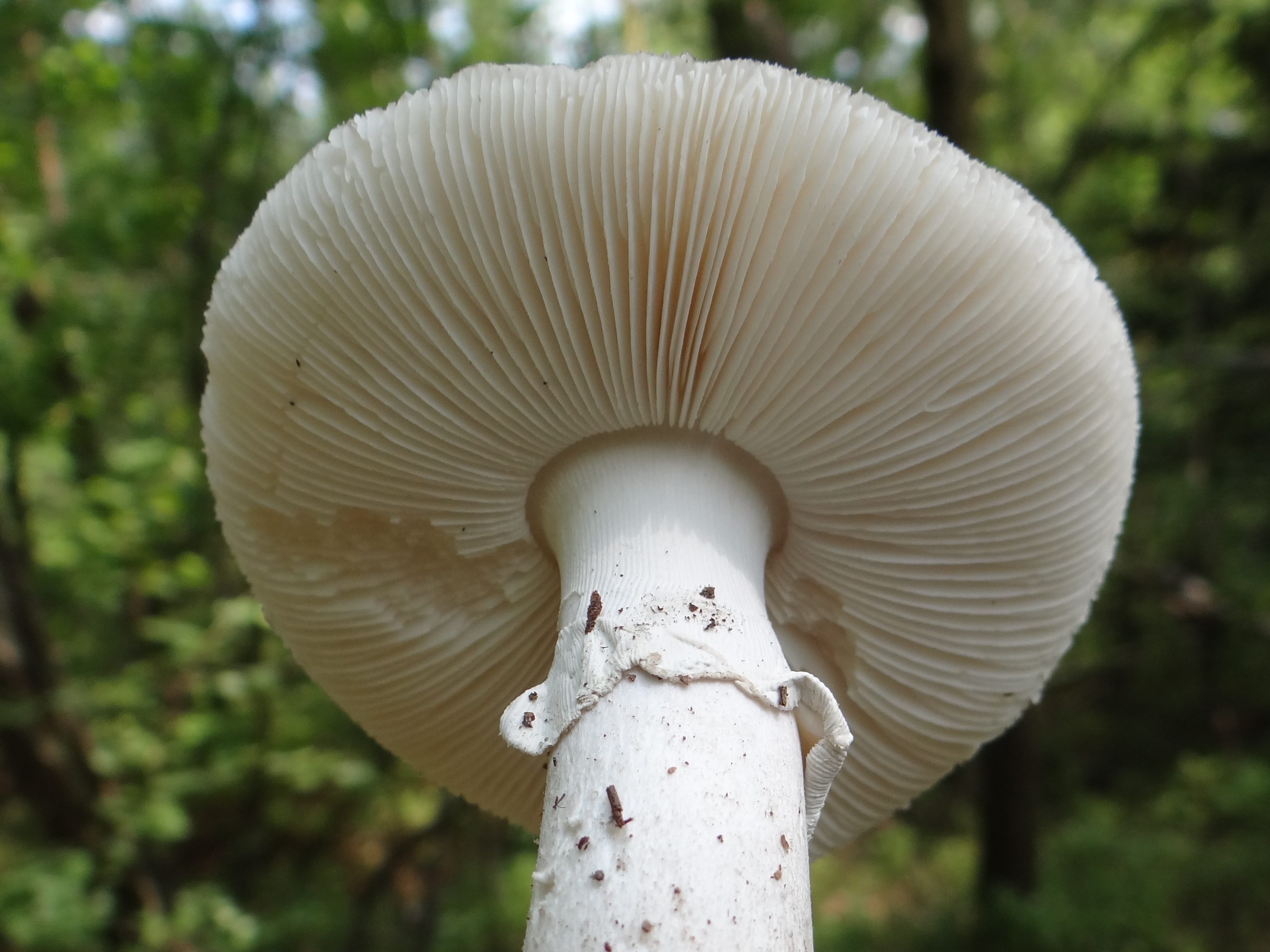 Amanita excelsa